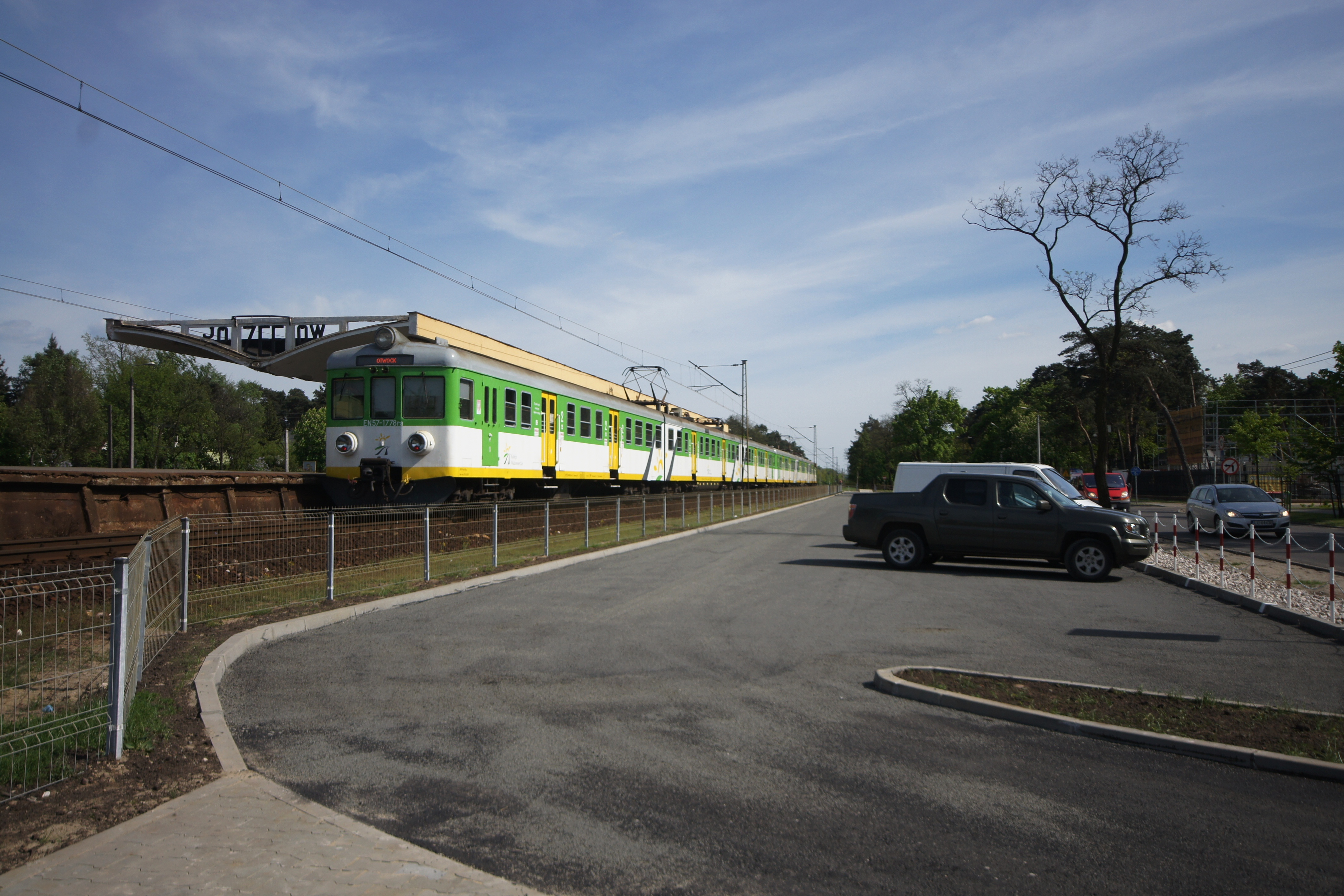 Parking "Parkuj i Jedź" (Park&Ride, P+R) w Józefowie przy przystanku kolejowym Józefów